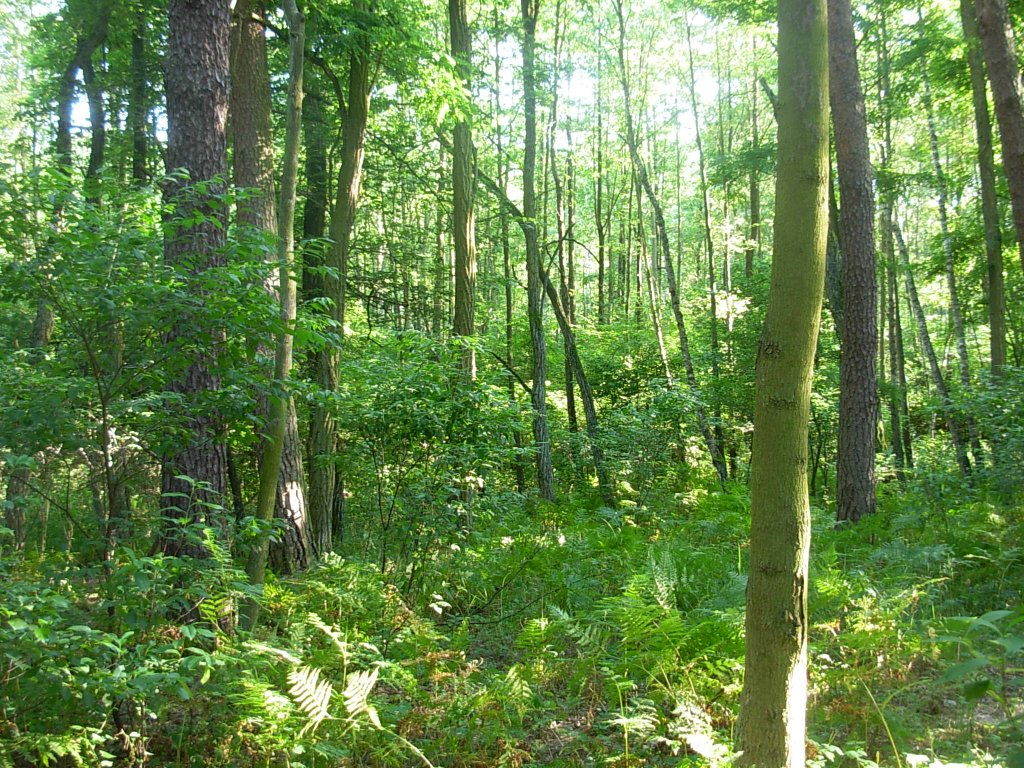 Puszcza Bydgoska - las mieszany w rejonie Chrośnej